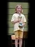 Lara Stock, Deutsche Jugendeinzelmeisterschaft 2000 der weiblichen Jugend U10 in Überlingen.